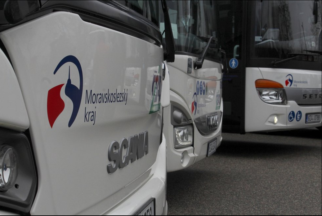 Nové autobusy ČSAD Vsetín pro Moravskosleský kraj